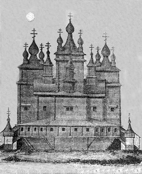 Воскресенский собор, построенный в г. Коле при царях Иоанне и Петре Алексеевичах в 1684 году и сожженный англичанами в 1854 году